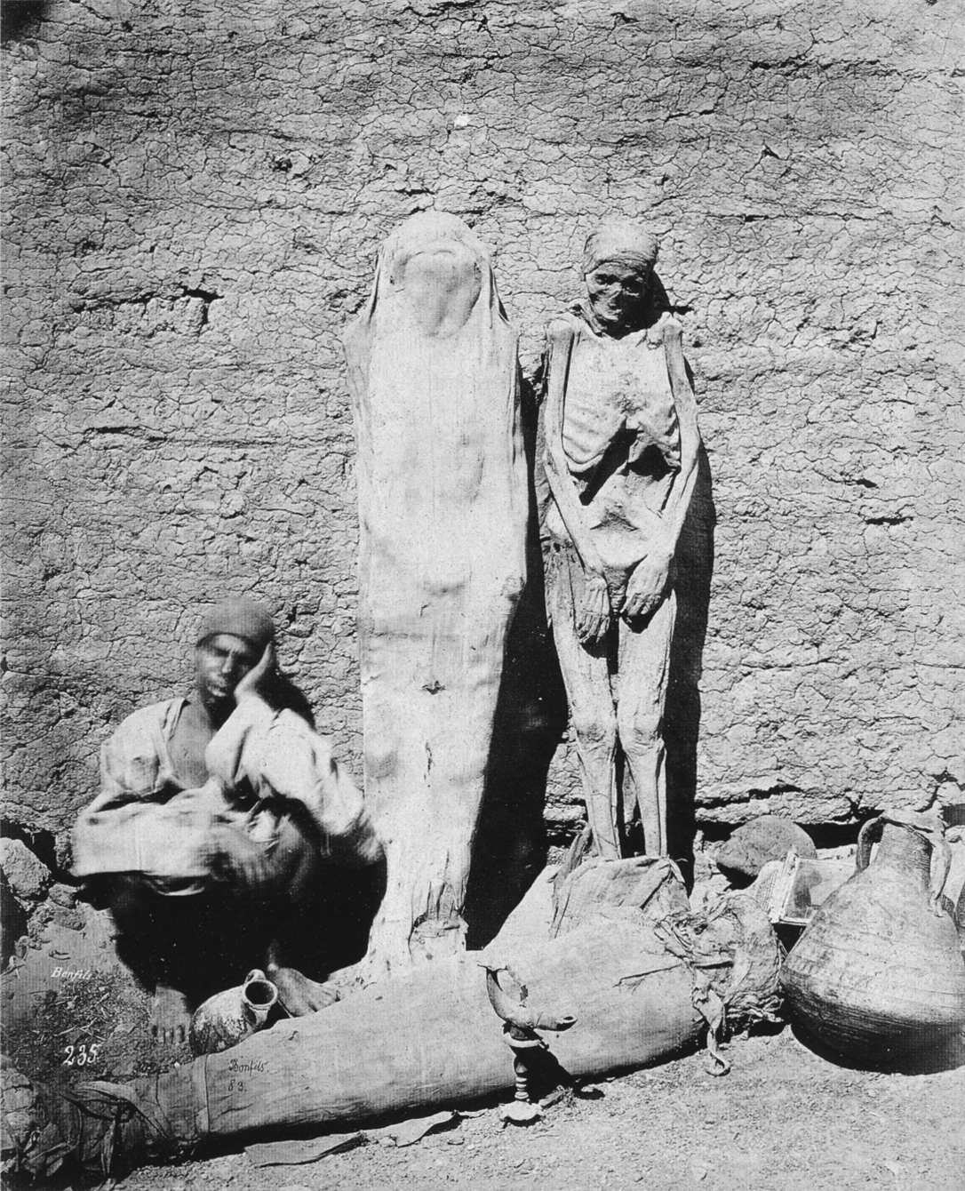 Ein dösender Mumienhändler. Fotografie von Félix Bonfils